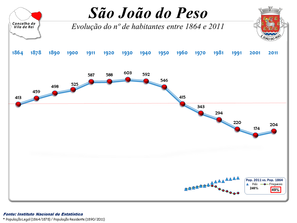 Evolução da População